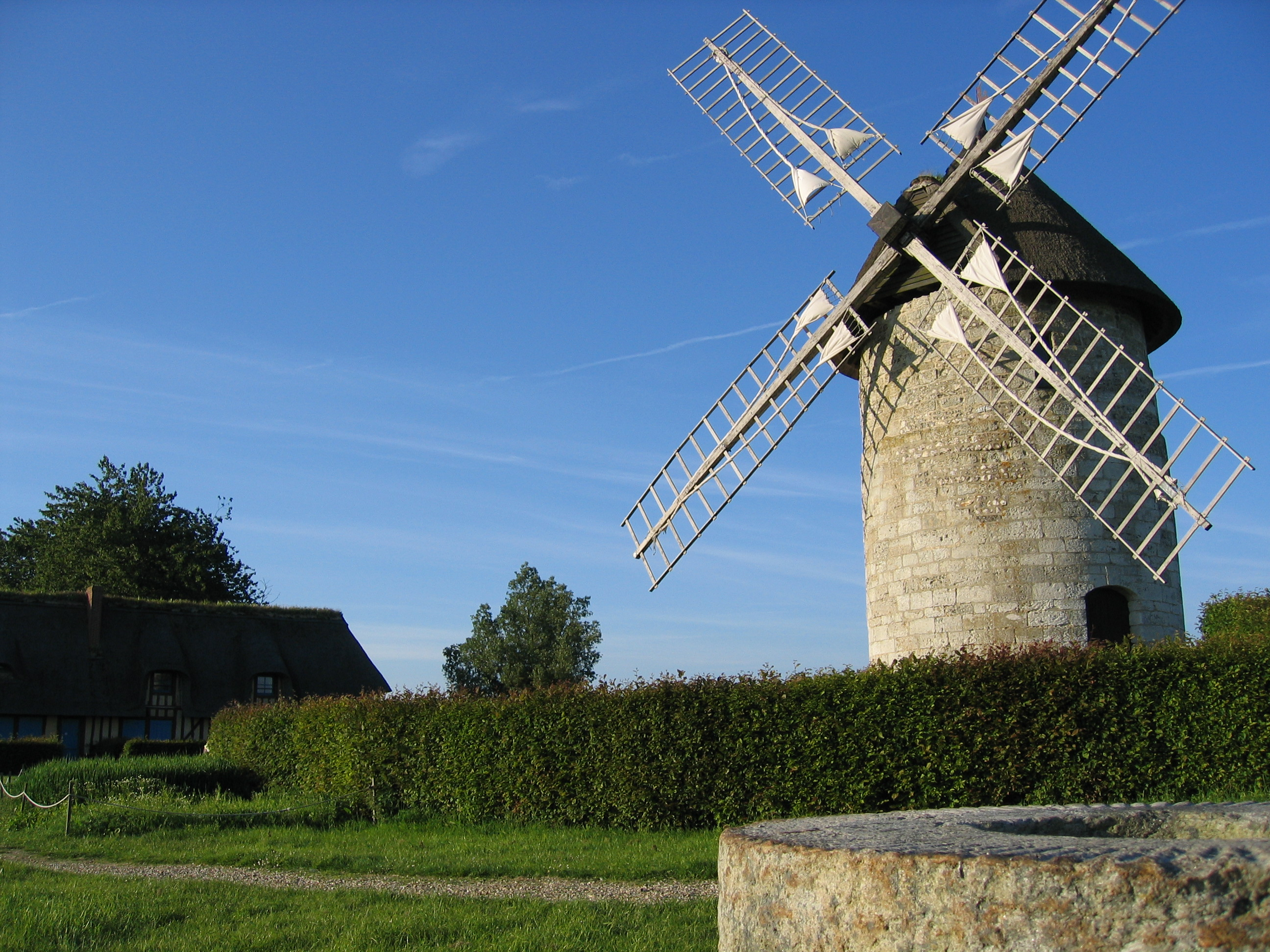 Photo de meules devant le moulin d'Hauville (27), prise en juin 2005. Sawyer